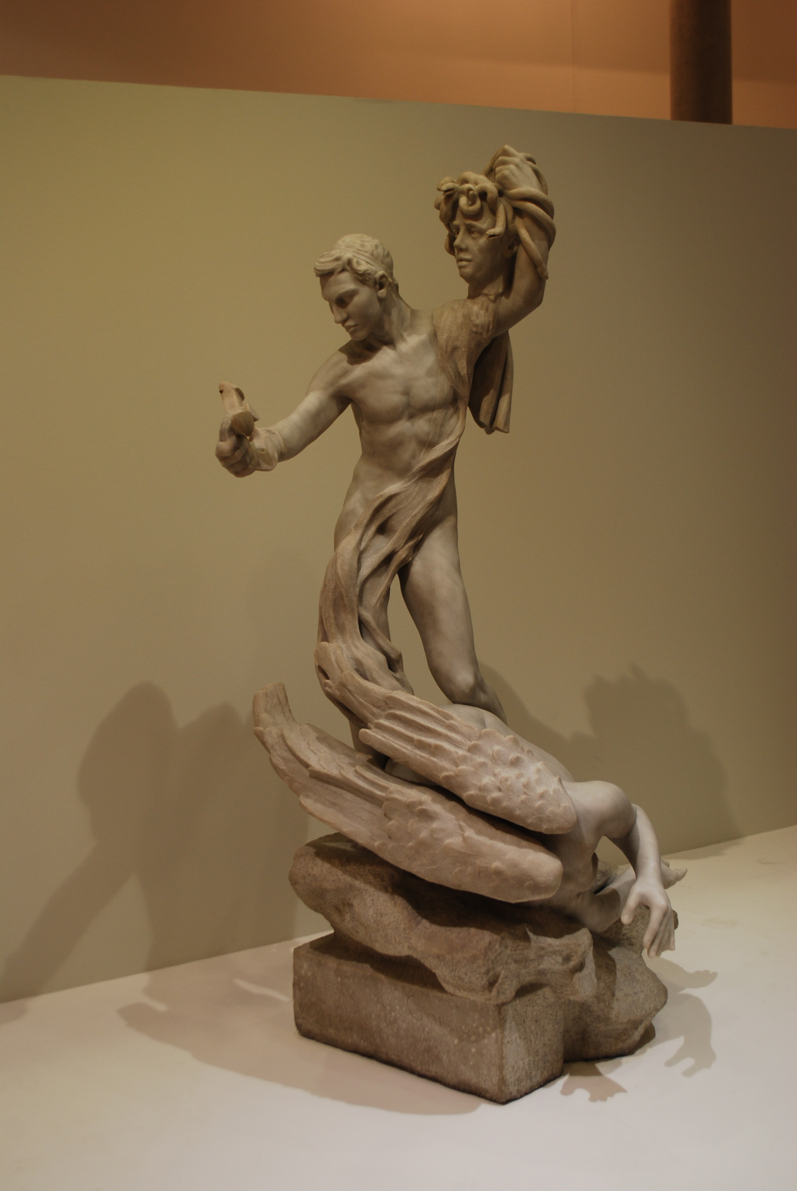 Vue de l'exposition "Camille Claudel (1864-1943). Au miroir d'un art nouveau", au Musée d'Art et d'Industrie de Roubaix (2014-2015). Sculpture Persée et la Gorgone.